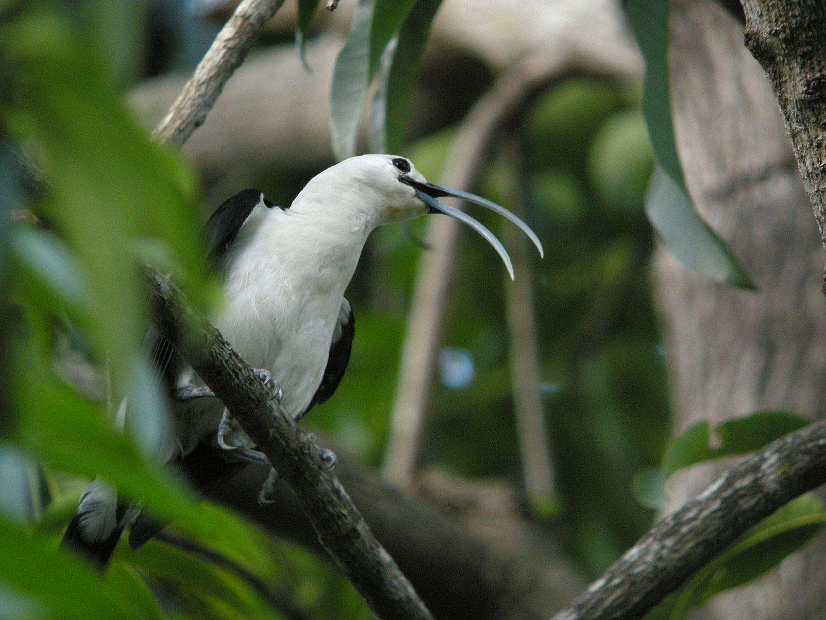 Sickle-billed Vanga (Falculea palliata), Ankarafantsika National Park, Madagascar Swarowski 80 HD 30 X, Coolpix P5100 (Adapter DCB)